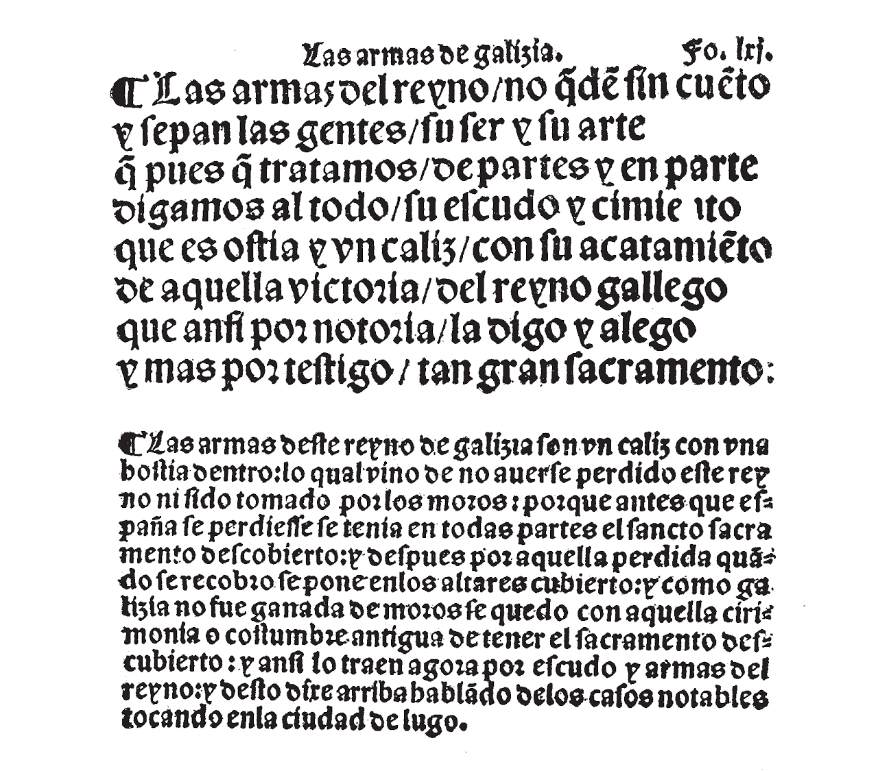 Armas de Galiza na Descripcion del Reyno de Galizia do licenciado Molina.